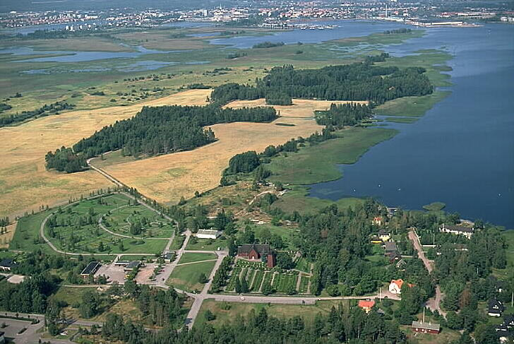 Hammarö kyrka i bildens nedre del. Motiv: Hammarö Nyckelord: Flygbilder, Riksintressen Kategori: Insjömiljöer Hammarö kyrka i bildens nedre del.